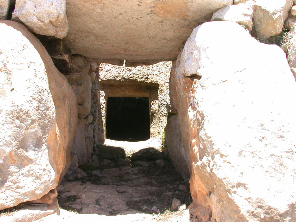 Acceso a una naveta de enterramiento menorquina.